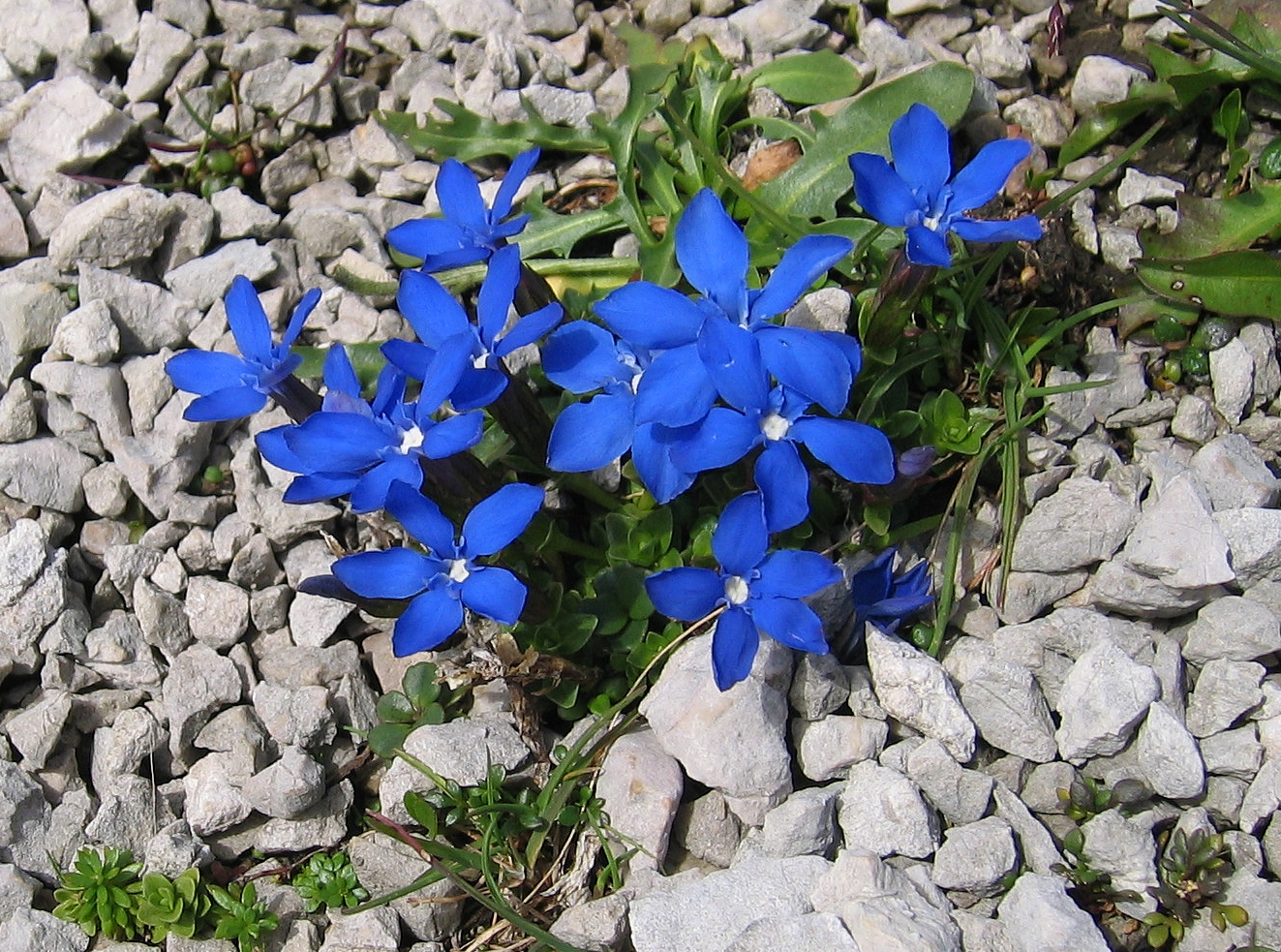 Gentiana orbicularis, Dachstein, Upper Austria, Austria